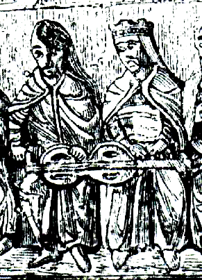 Organistrum de Boscherville (Francia); dibujo.